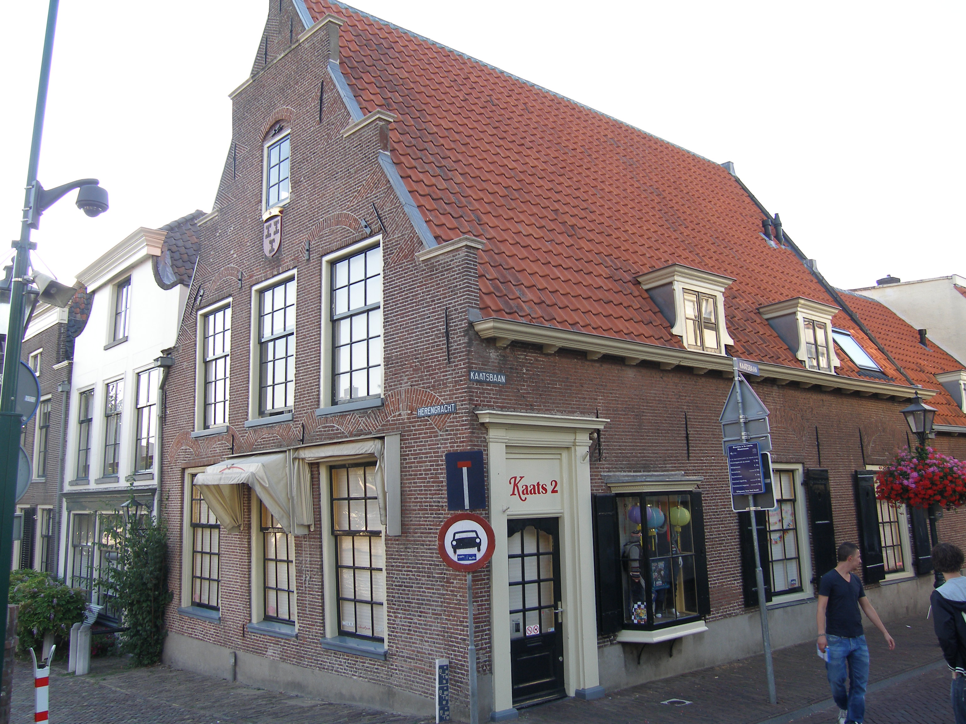 Project Maarssen rijksmonumenten